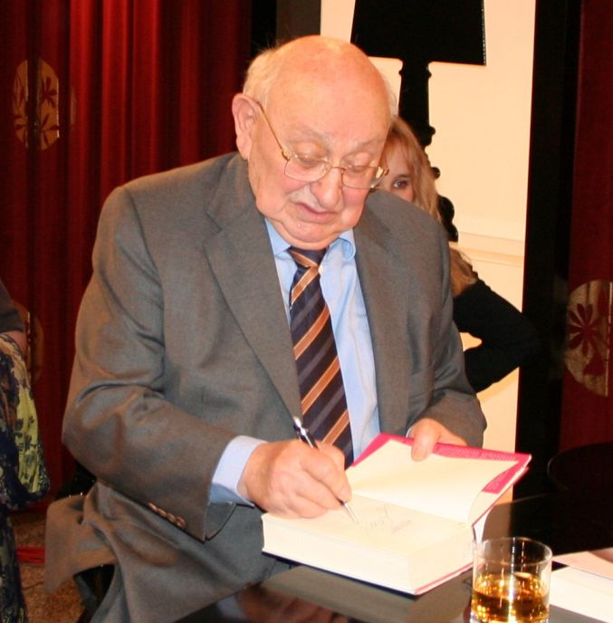 Marcel Reich-Ranicki bei der TV-Sendung Literatur im Foyer im Mainzer SWR-Funkhaus